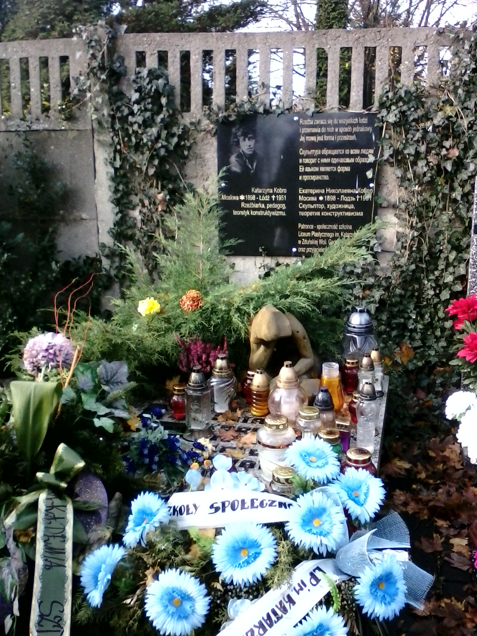 Могила Екатерины Кобро и ей дочери Ники. Православное кладбище, г. Лодзь. Польша.